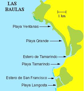 Diagrama del Parque Nacional Marino Las Baulas. La parte en verde corresponde al área del parque.